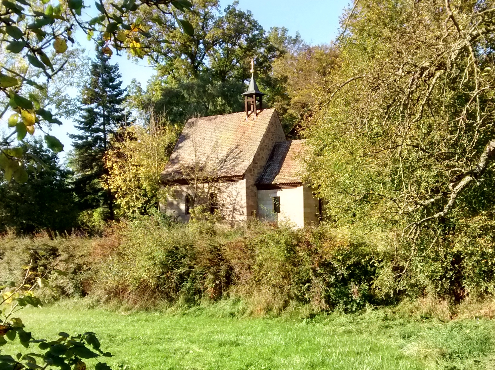 Burg-Kapelle Leonrod